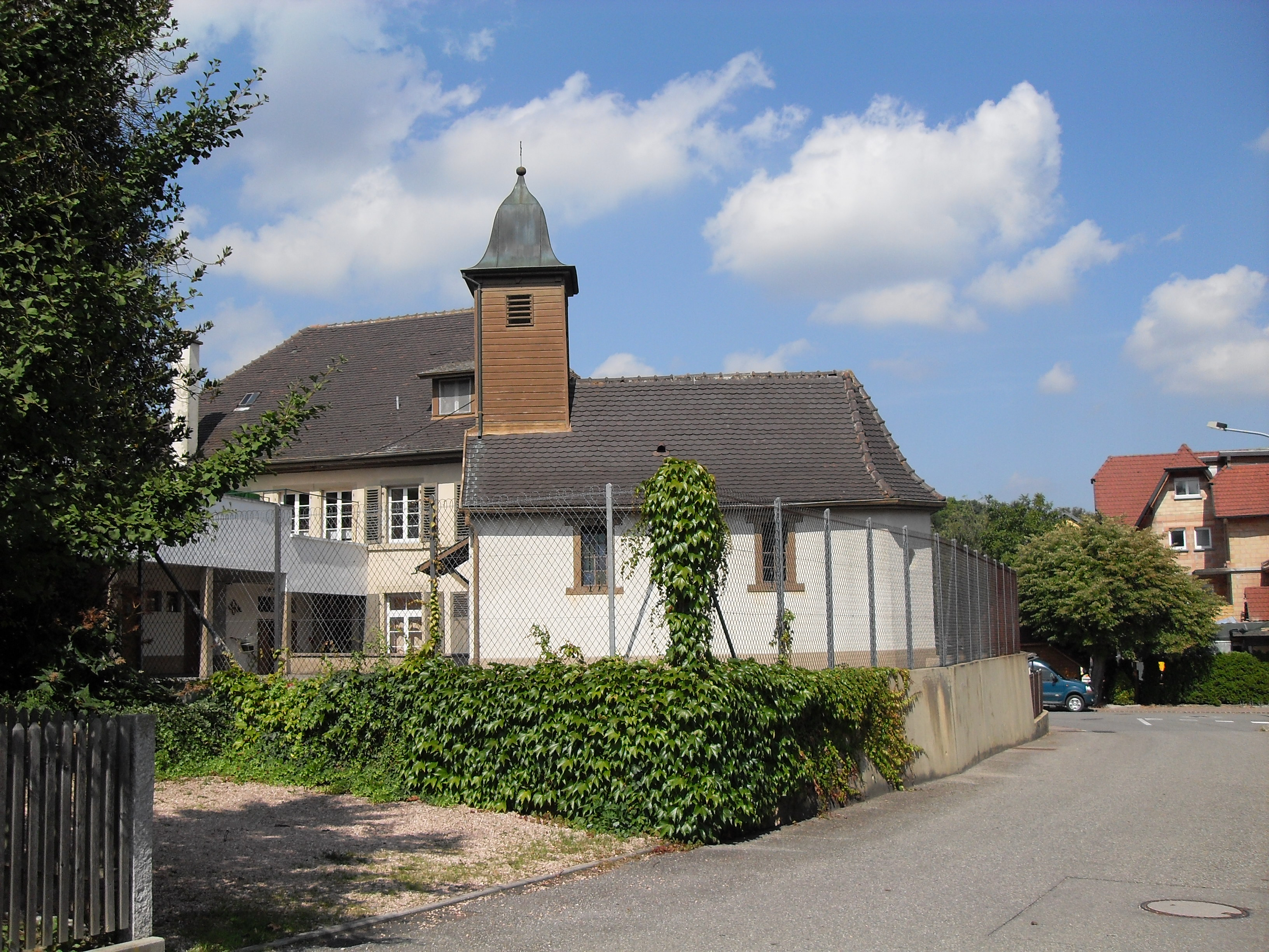 La chapelle Sainte-Catherine à Hagenthal-le-Haut